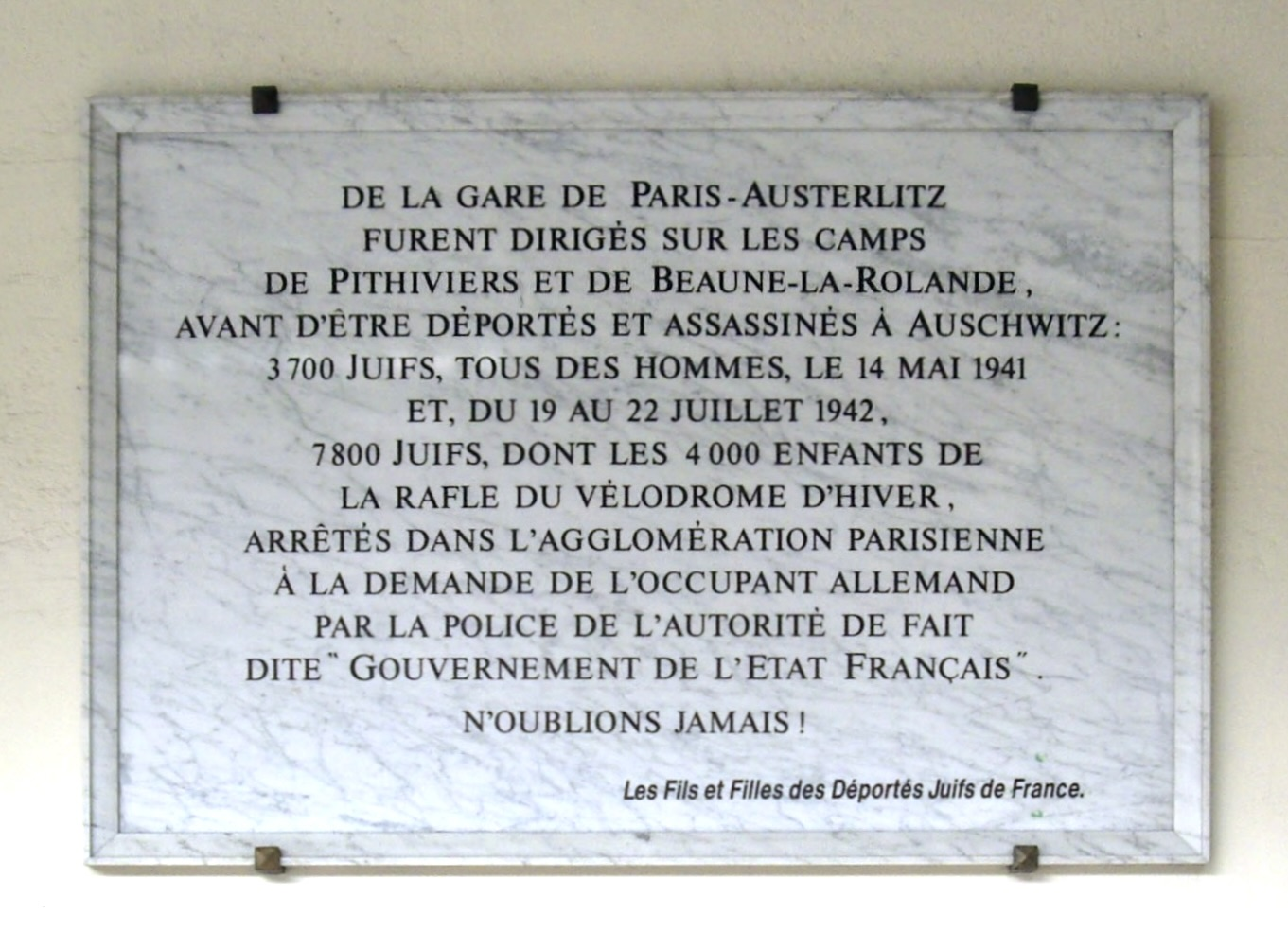 Plaque en mémoire des déportés juifs de France à la gare de Paris-Austerlitz.« De la gare de Paris-Austerlitz furent dirigés sur les camps de Pithiviers et de Beaune-la-Rolande, avant d'être déportés et assassinés à Auschwitz : 3700 Juifs, tous des hommes, le 14 mai 1941 et, du 19 au 22 juillet 1942, 7800 Juifs, dont les 4000 enfants de la râfle du vélodrome d'Hiver, arrêtés dans l'agglomération parisienne à la demande de l'occupant allemand par la police de l'autorité de fait dite « Gouvernement de l'État français ».N'oublions jamais !Les Fils et Filles des Déportés Juifs de France. »